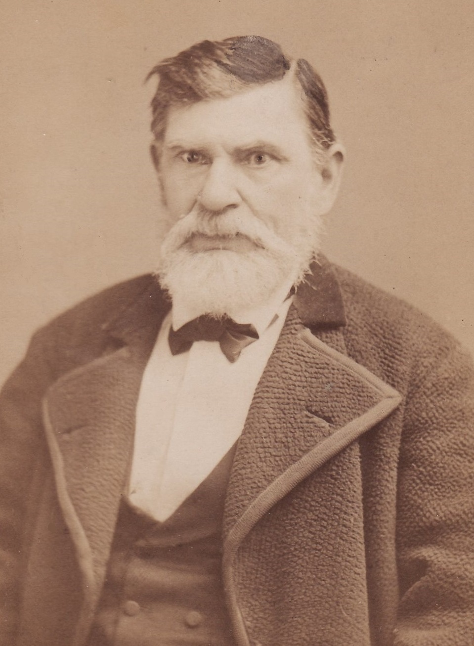 Bild von Carl Eduard Cramer